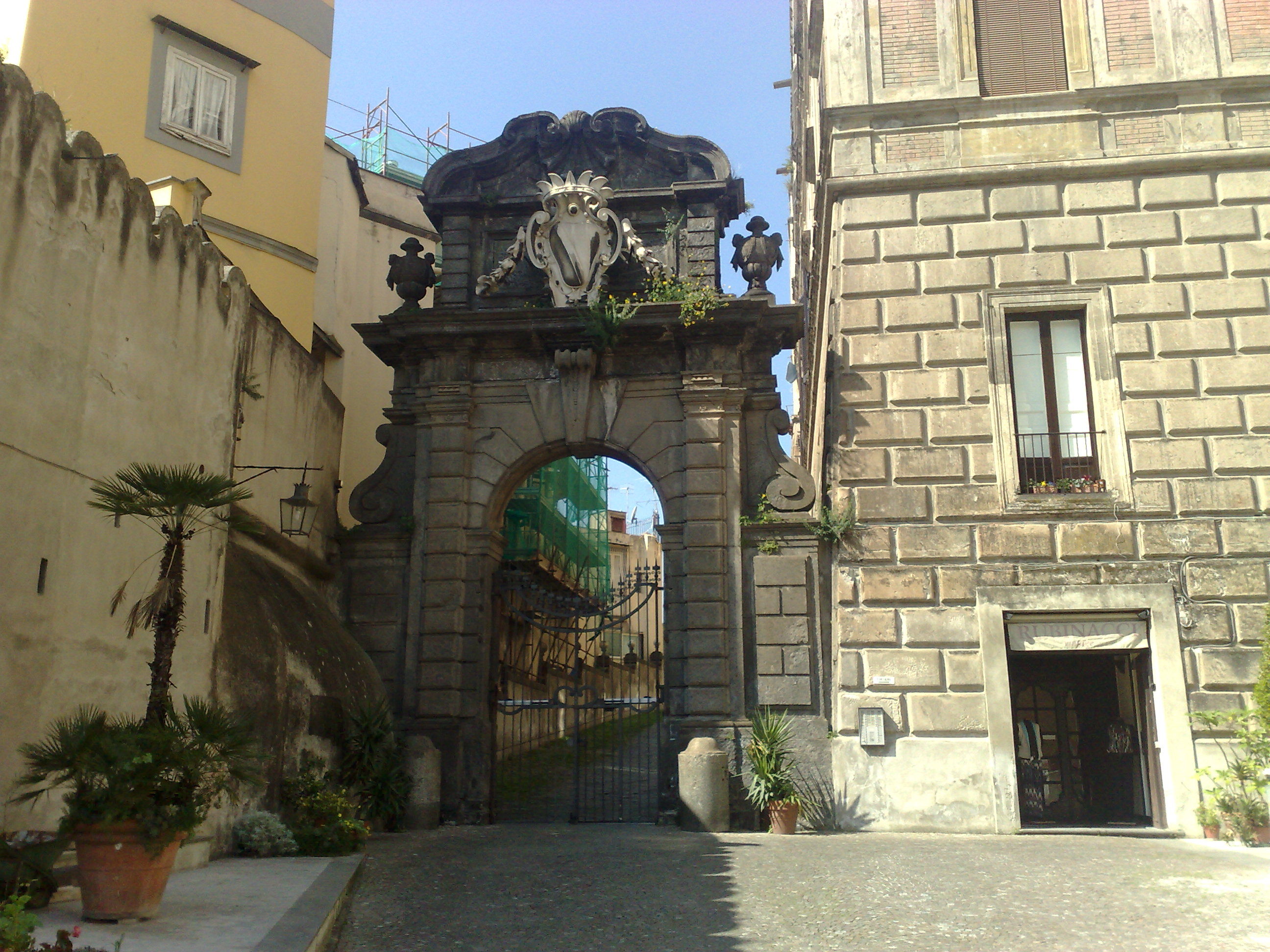 Portone del palazzo di Cellammare (Napoli)